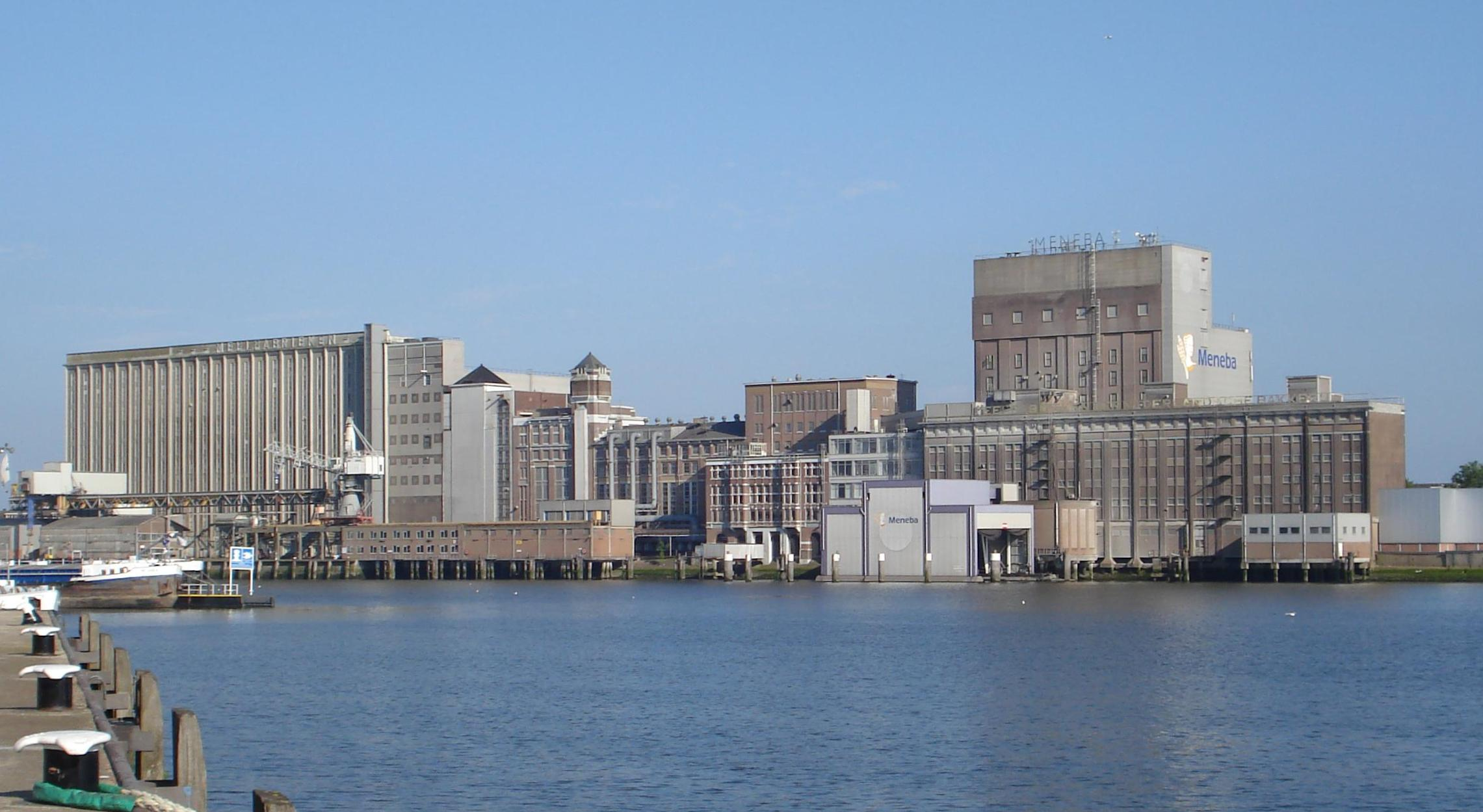 Rotterdam, Maashaven zuidzijde. Meneba fabriek. Rotterdam/The Netherlands.